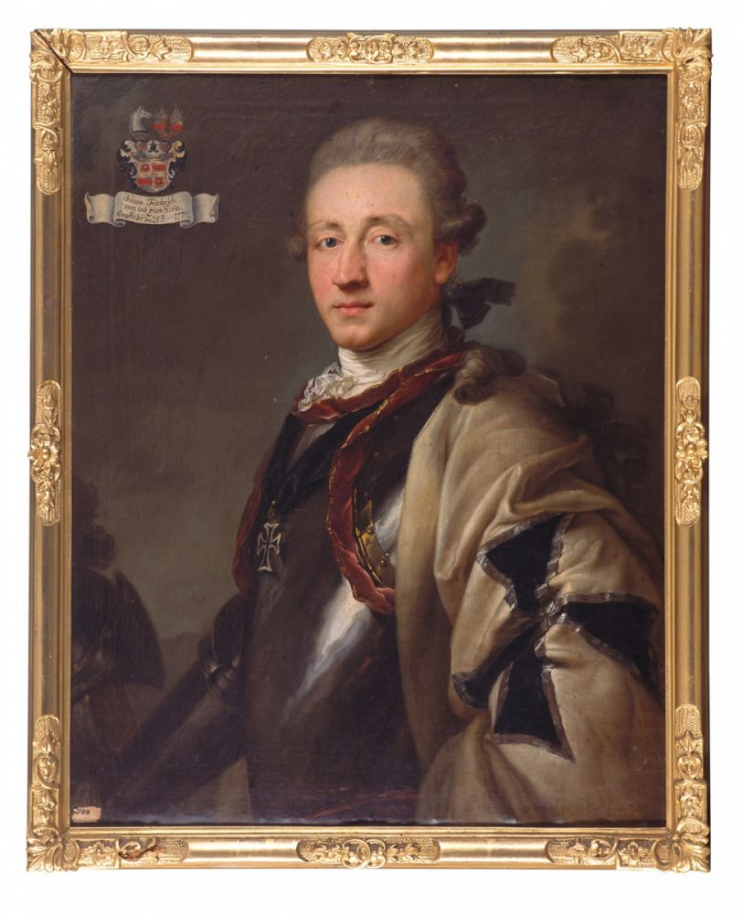 Ordensritter Johann Friedrich Freiherr von und zum Stein (1749 - 1799) - Öl/Lwd. 86 x 68 cm